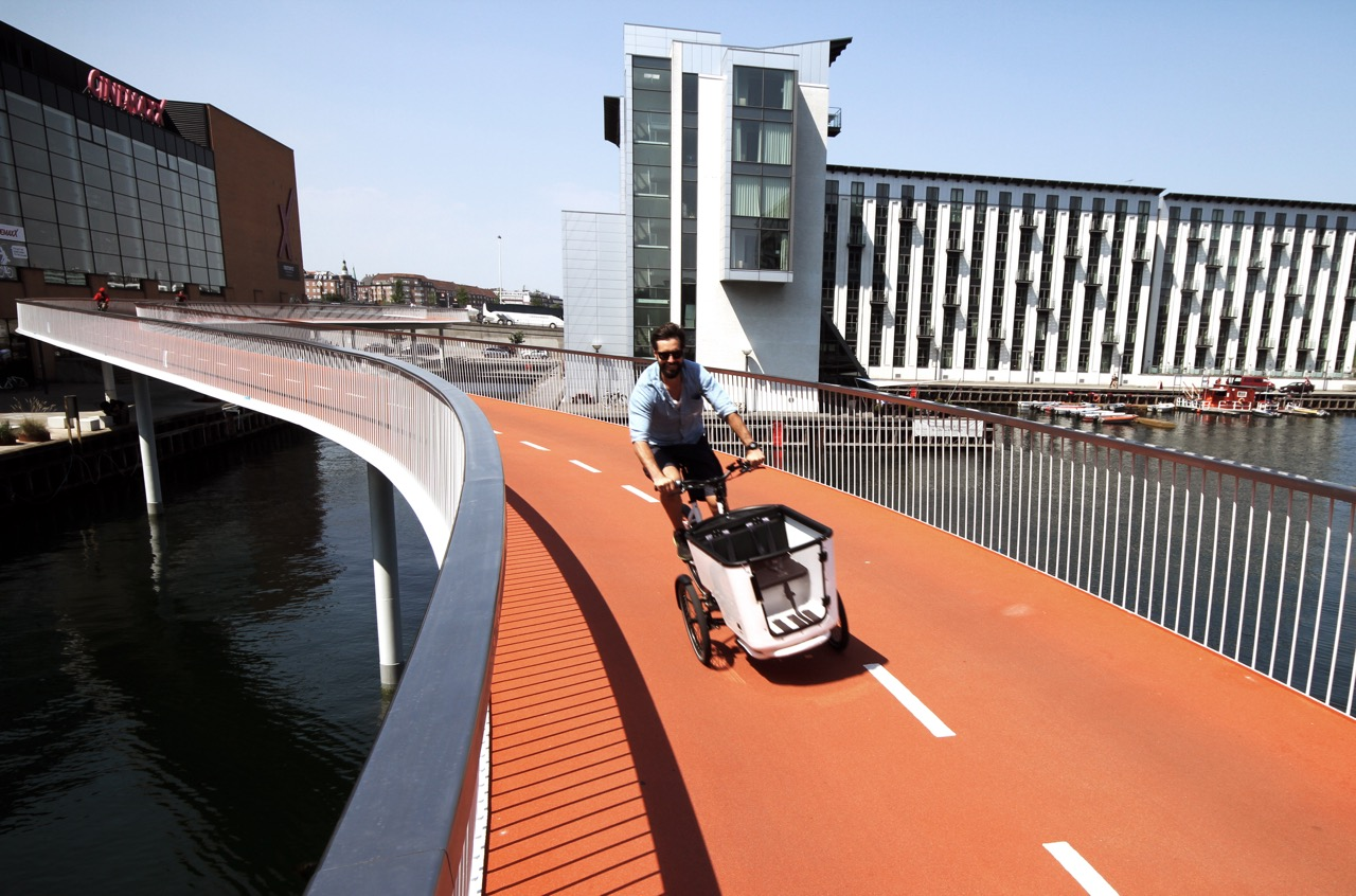 Butchers & Bicycles Cargo Bikes from Copenhagen, Denmark